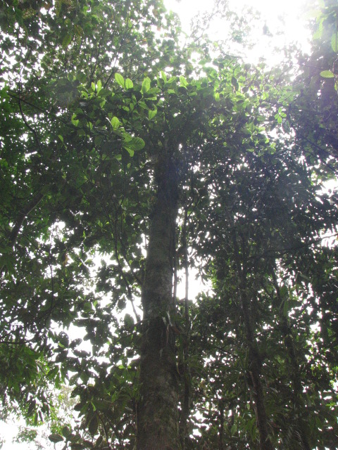 Individuo de Sterigmapetalum tachirense ubicado en la Reserva Biológica Cachalú en el sendero que va desde la Torre de Observación hasta la parcela permanente de fenologia, identificado con el número 440.